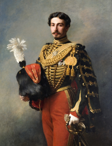 Édouard André (1833-1894). Portrait par Franz-Xaver Winterhalter. Paris, Musée Jacquemart-André.